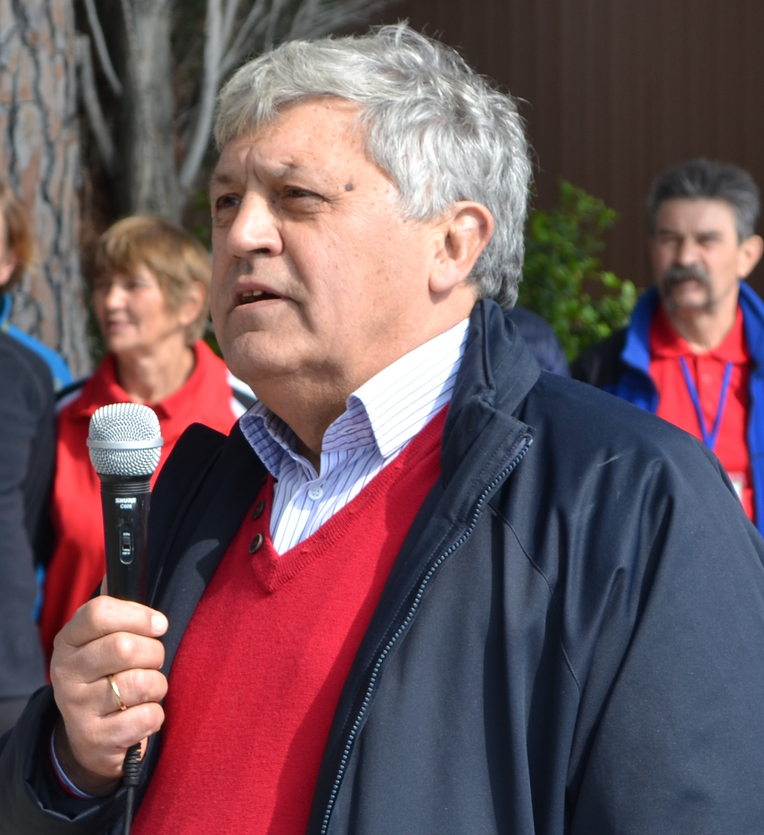 Валентин Симоненко поздравляет участников Чемпионата мира по альпинизму с окончанием, Крым, 2013.